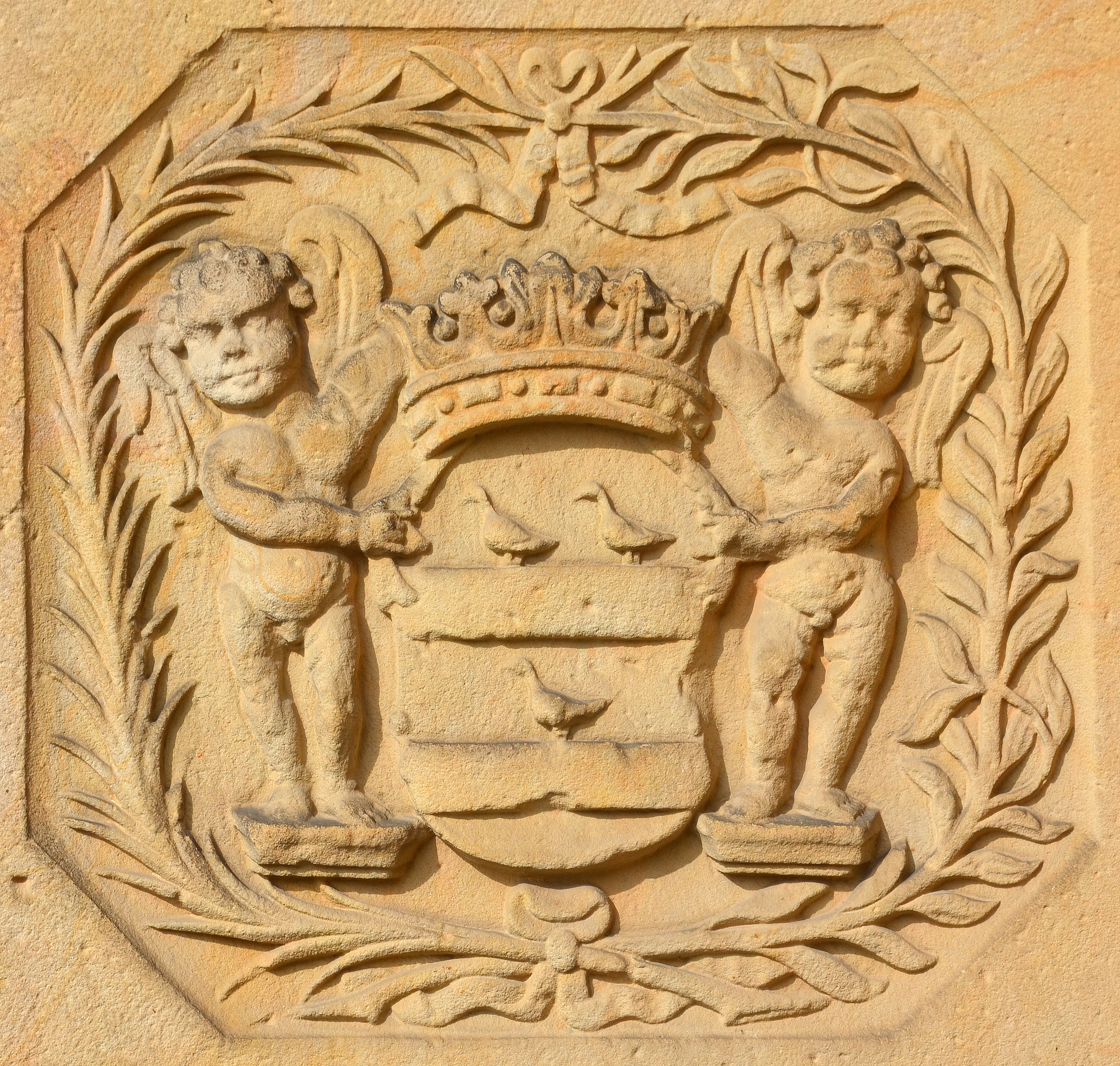 Wappen des Barons Isaac Anton de Sansdouville Dupuis de Sacetôt in dessen Epitaph an der Aussenwand der Neustädter Hof- und Stadtkirche St. Johannis in Hannover im heutigen Stadtteil Calenberger Neustadt ...